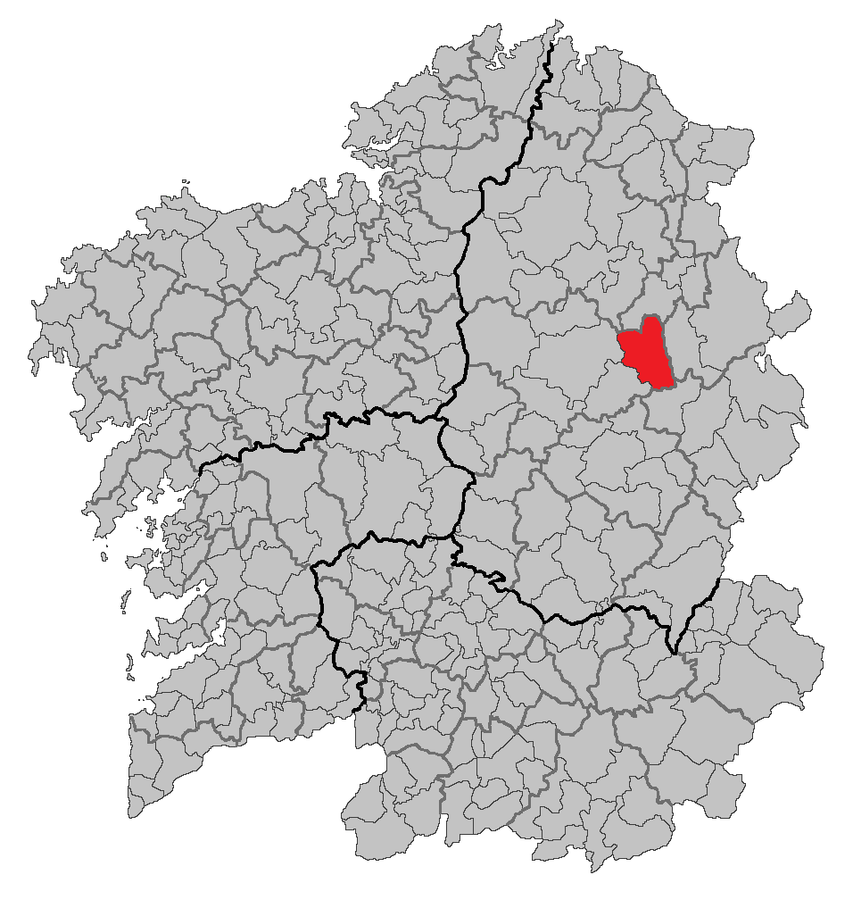 Mapa coa localización do concello de Castroverde.